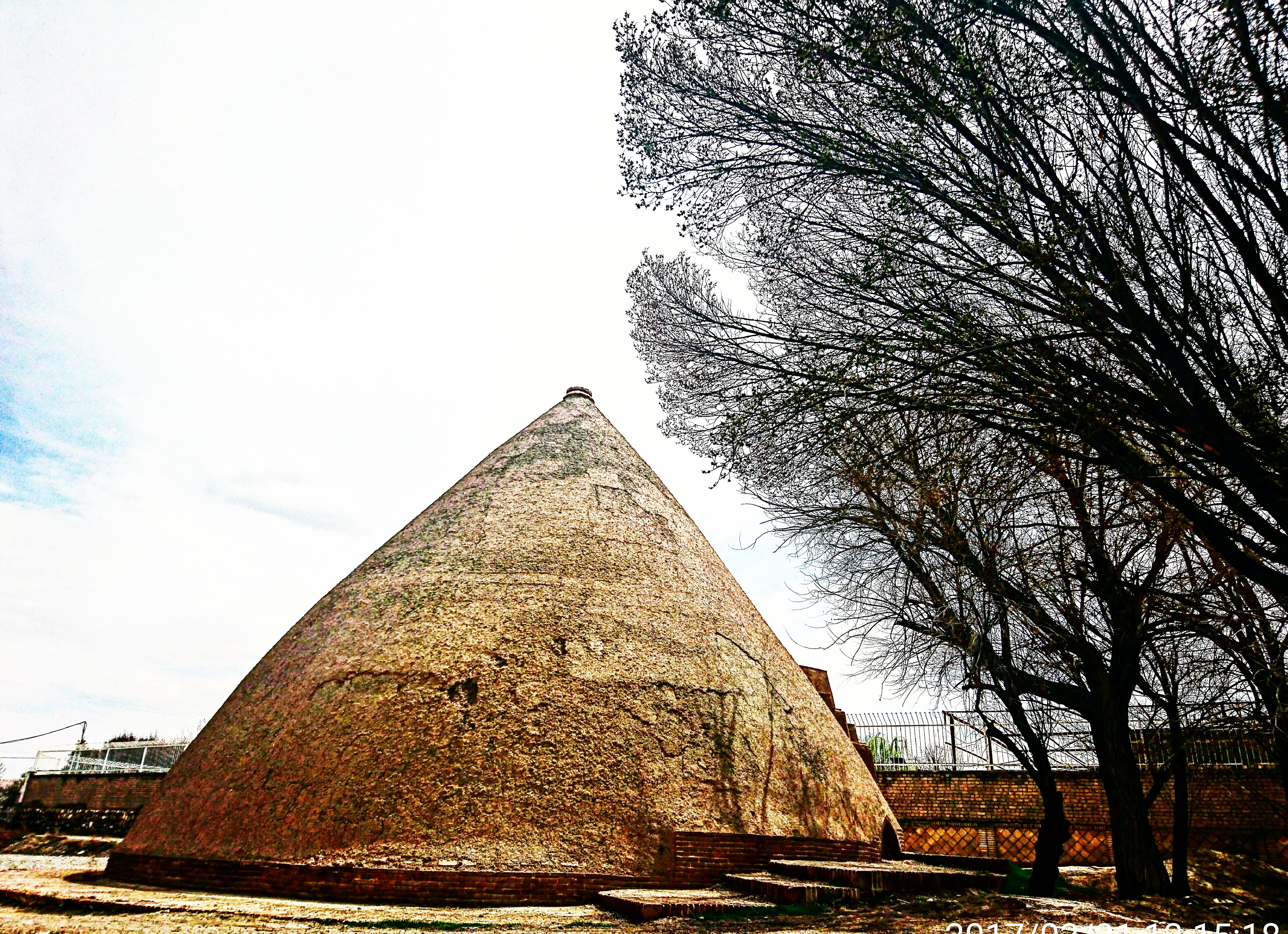 یخچال نیم ور